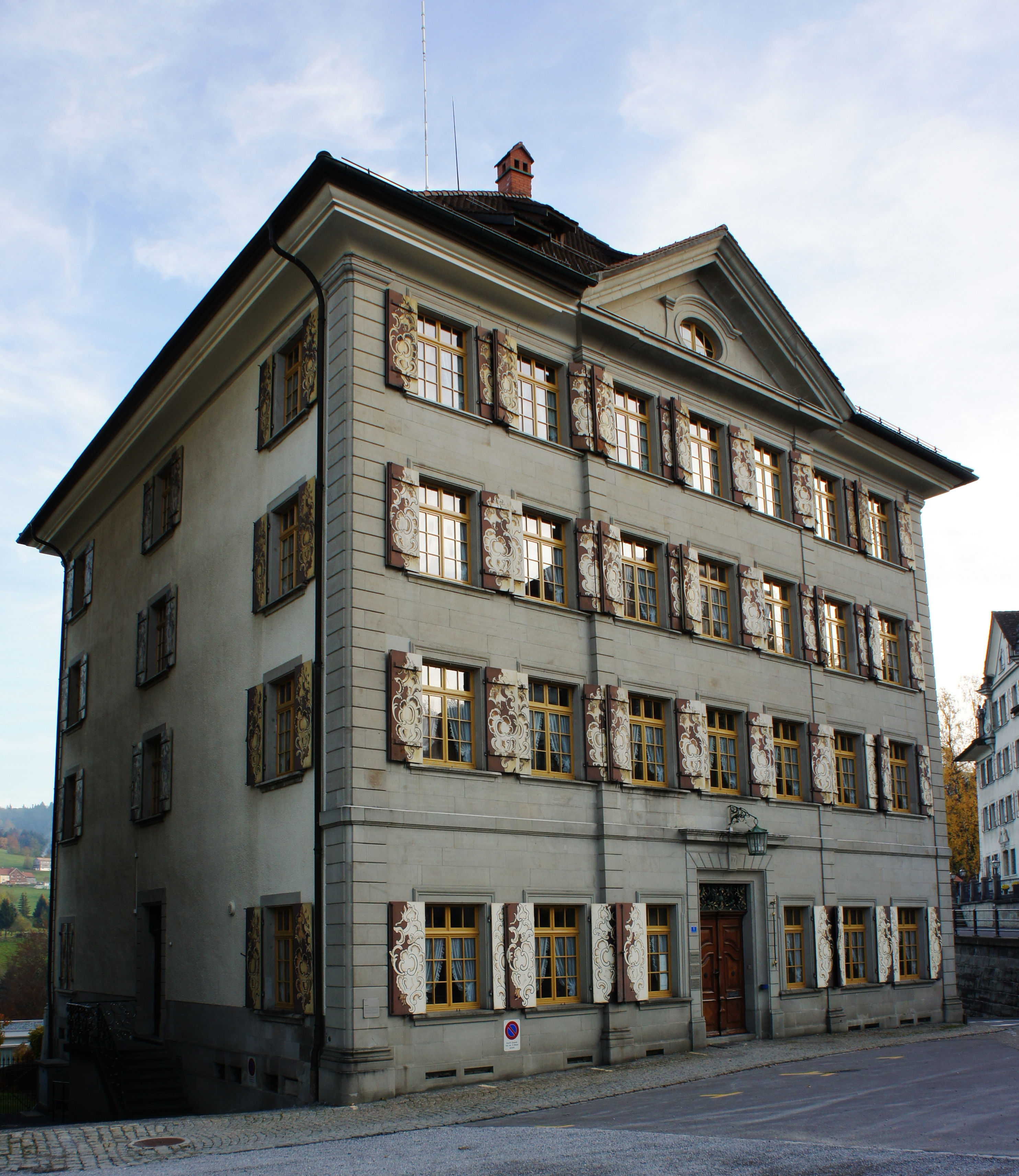 Blick aus Norden auf das Pfarr- und Gemeindehaus am Landsgemeindeplatz 1 in Trogen. Es hat vier Stockwerke und alle symmetrisch angeordneten Fenster sind mit Braun und Ocker bemalten Fensterläden versehen. Die Hauptfassade ist mit Steinplatten (eventuell Imitationen) ausgestattet. In der Mitte über der Front ist ein kleiner Giebel mit ovalem Fenster in das Dach eingebaut.